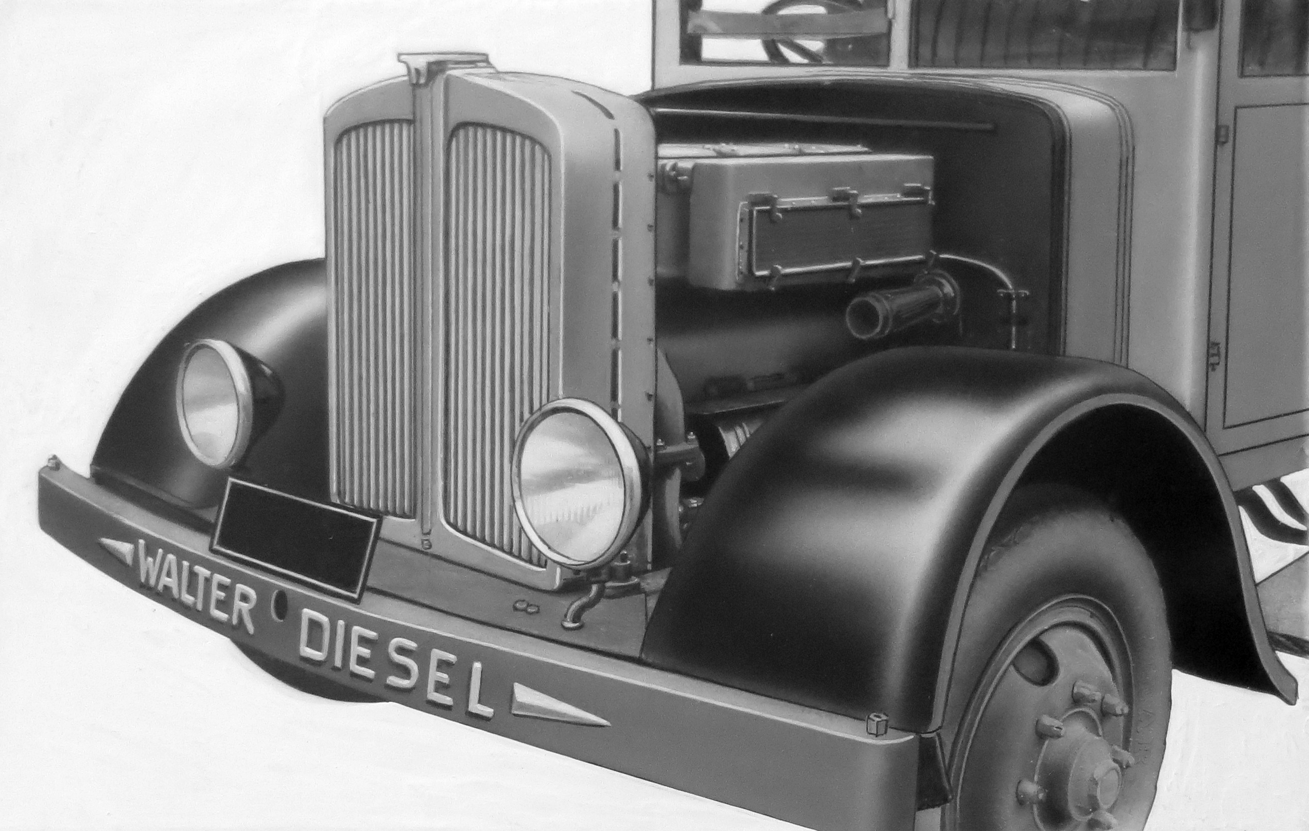 Walter Diesel 5 t s motorem SA 12 na podvozku FNA